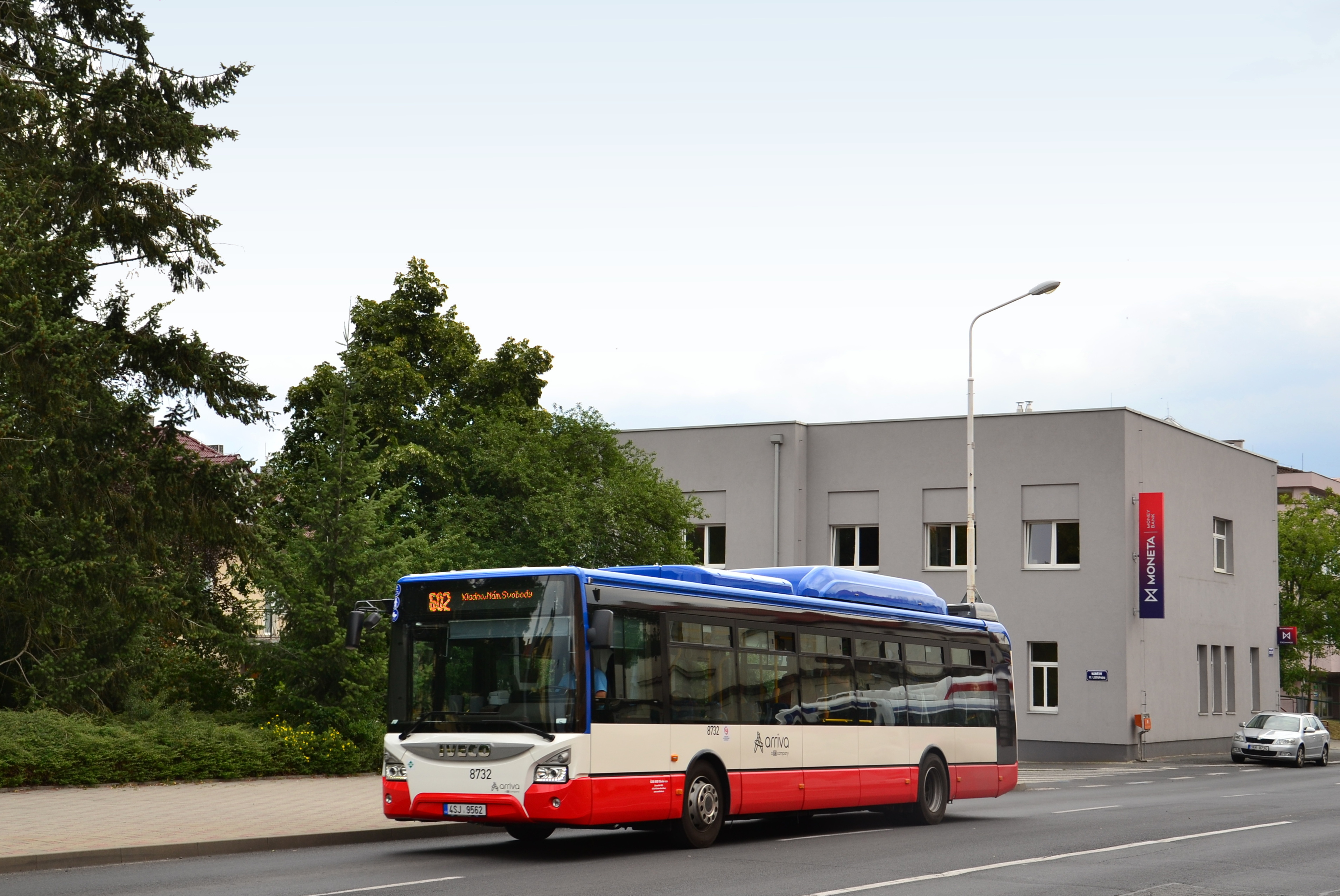 Vůz Iveco Urbanway na lince MHD Kladno.